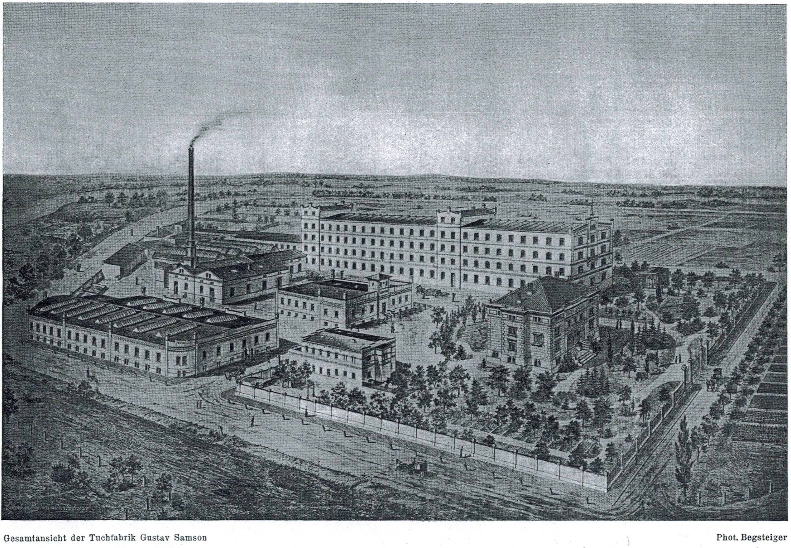 Fabrik Samson-001, früher